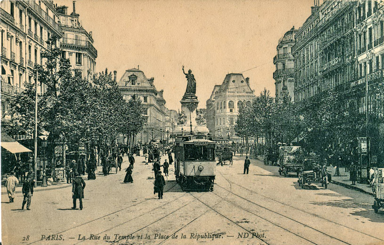 Carte postale ancienne éditée par ND, N°28Paris : Rue du Temple et la Place de la RépubliqueTramway électrique vers l'Opéra, ligne exploitée par la compagnie de l'Est Parisien